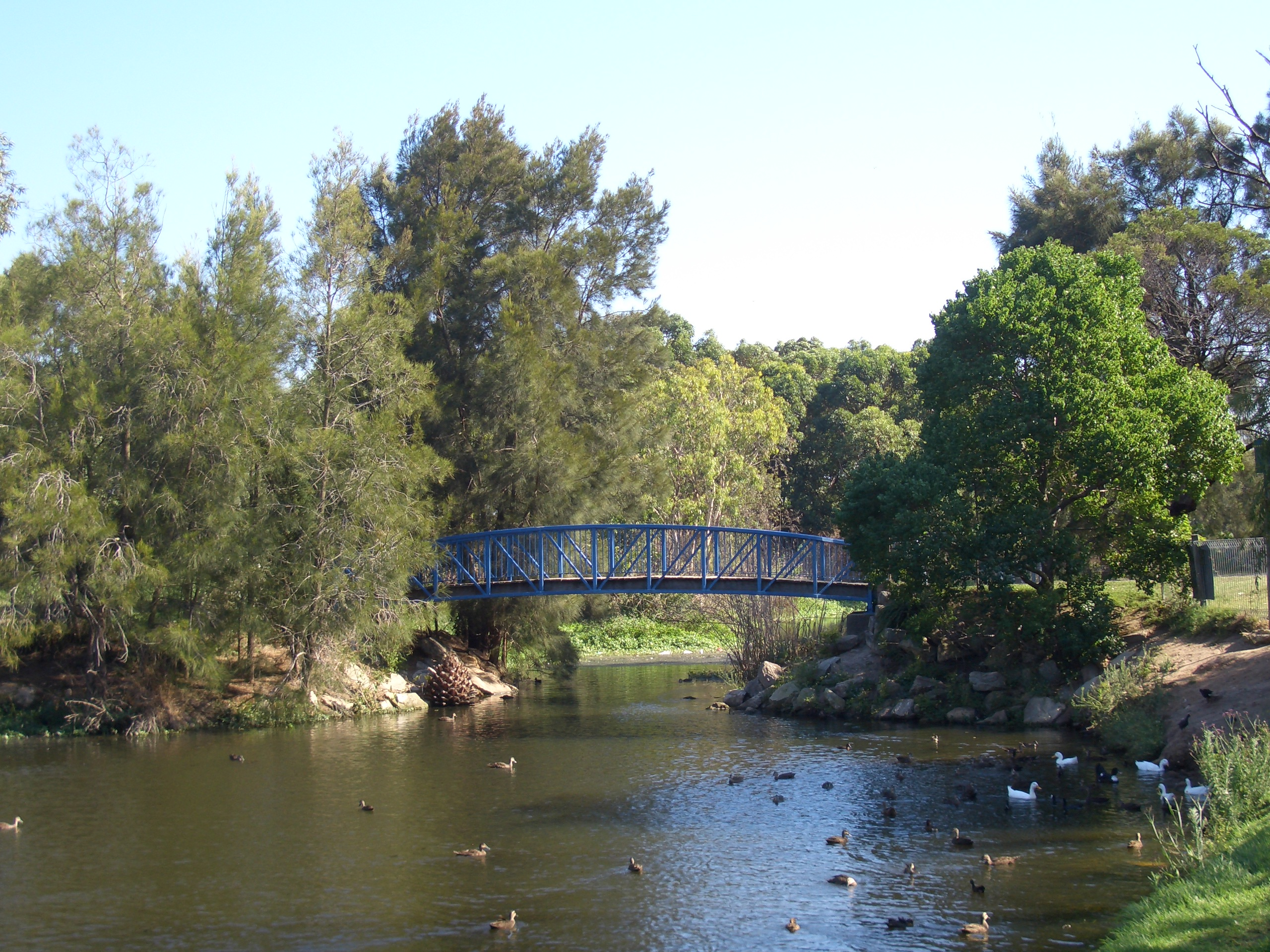 Rockdale Bicentennial Park